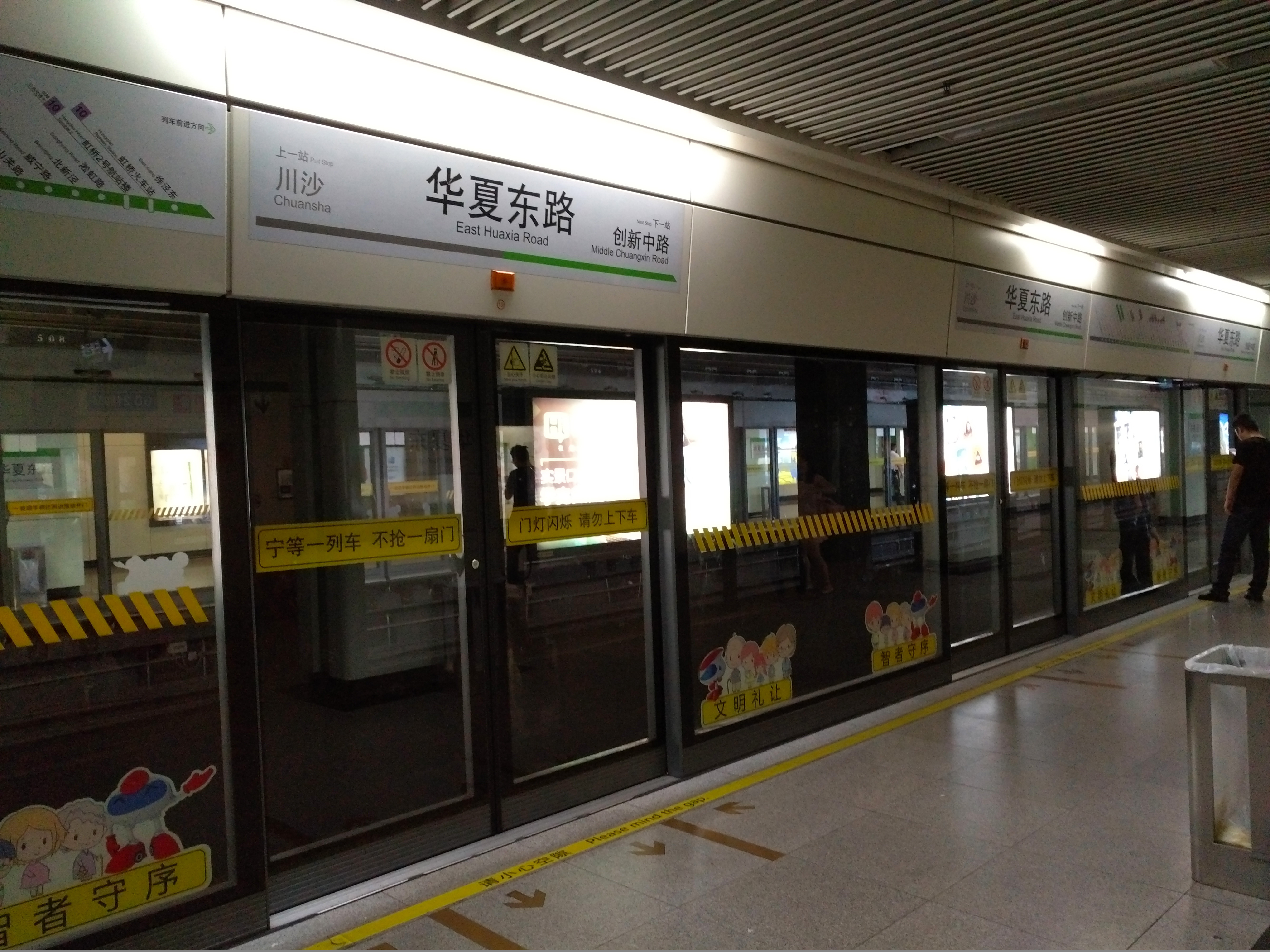 往徐泾东方向站台。